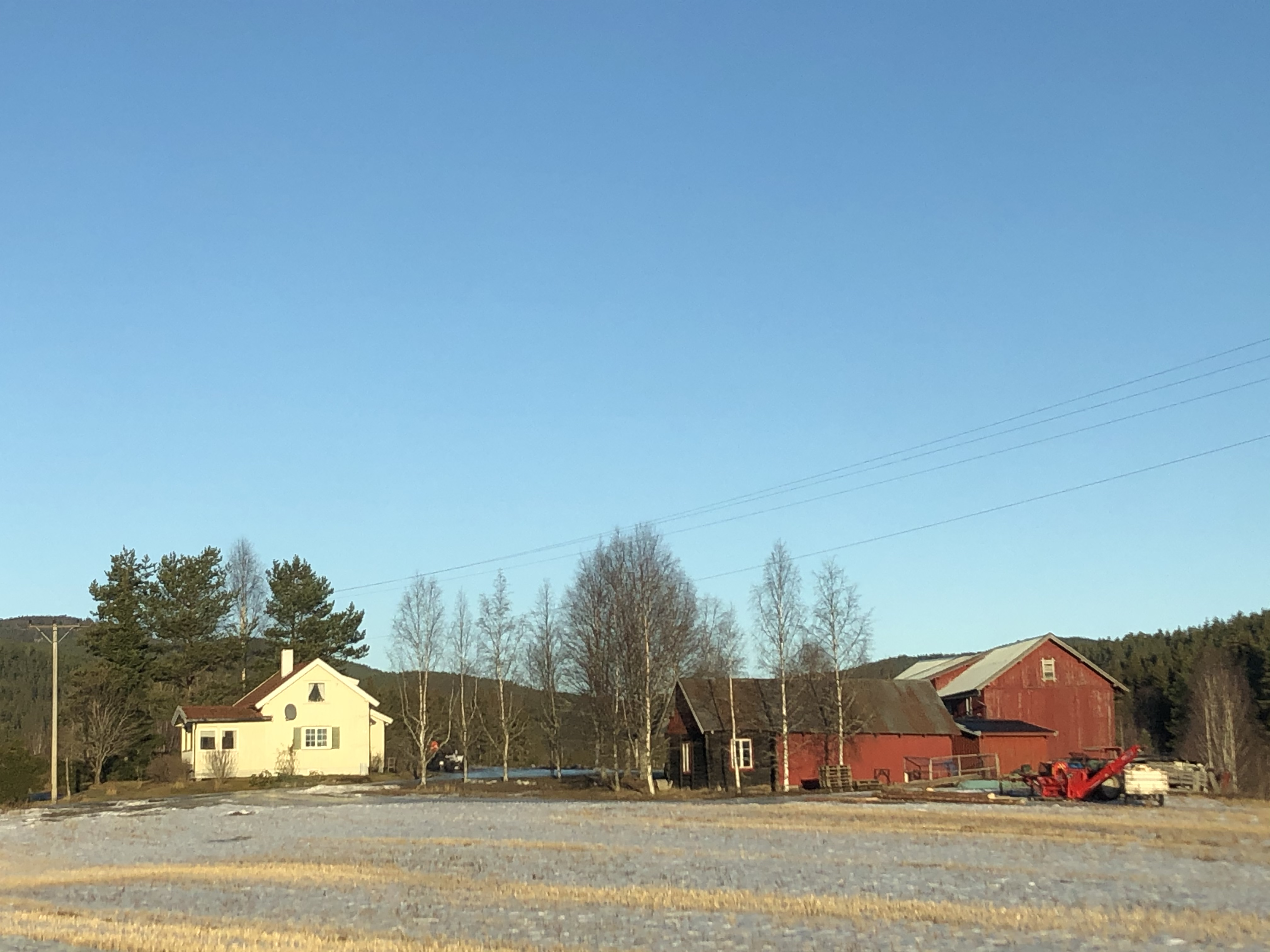 Vemeveien 69 (Gunbjørrud gård), Veme, Ringerike